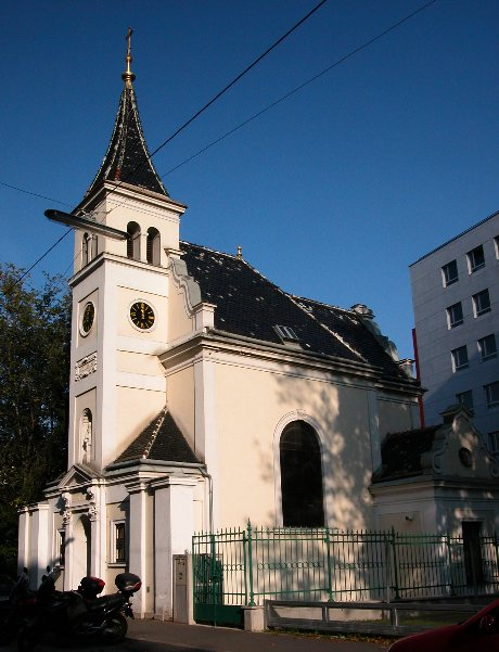 Elisabeth-Kapelle, ehemalige Spitalskapelle des Mautner Markhof´schen Kinderspitals in Wien-Landstraße (Kleingasse)